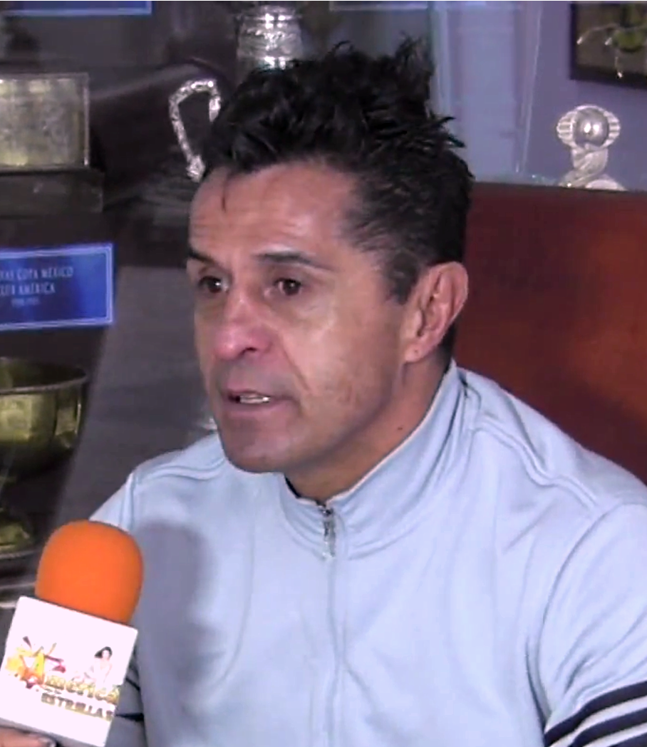 Cuchillo Herrera en 2016